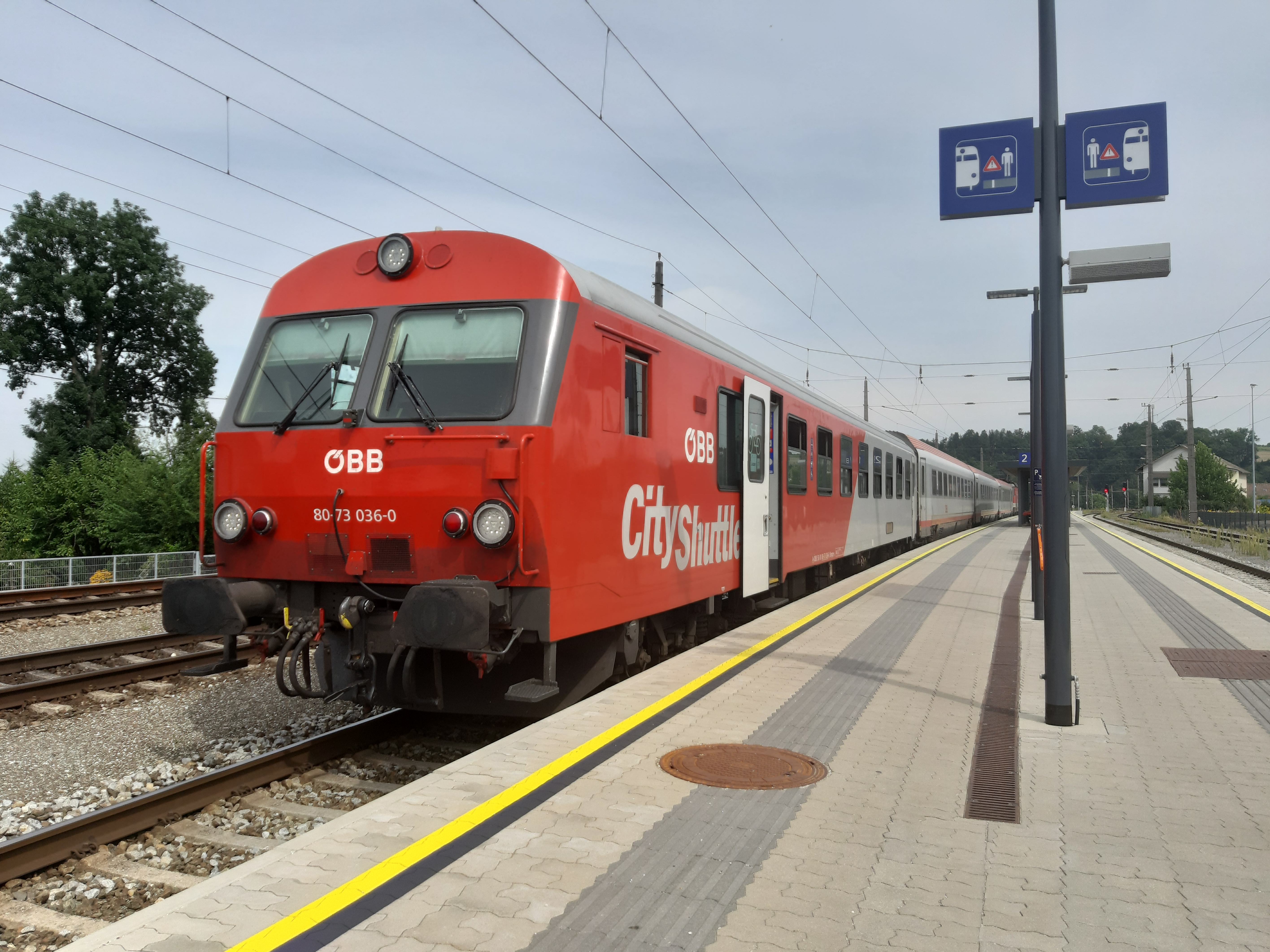 ÖBB 80-73 036 als IC 601 nach Graz in Rohr Bad Hall